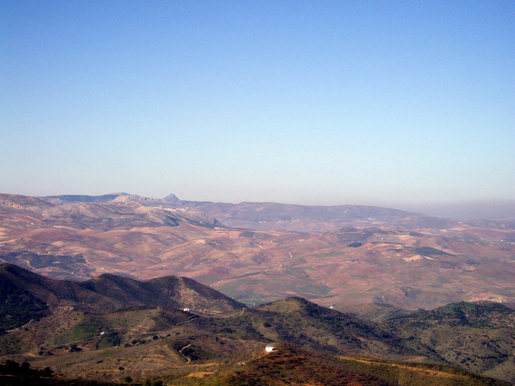 Vista de Teba desde la Sierra de Aguas, Málaga, España.